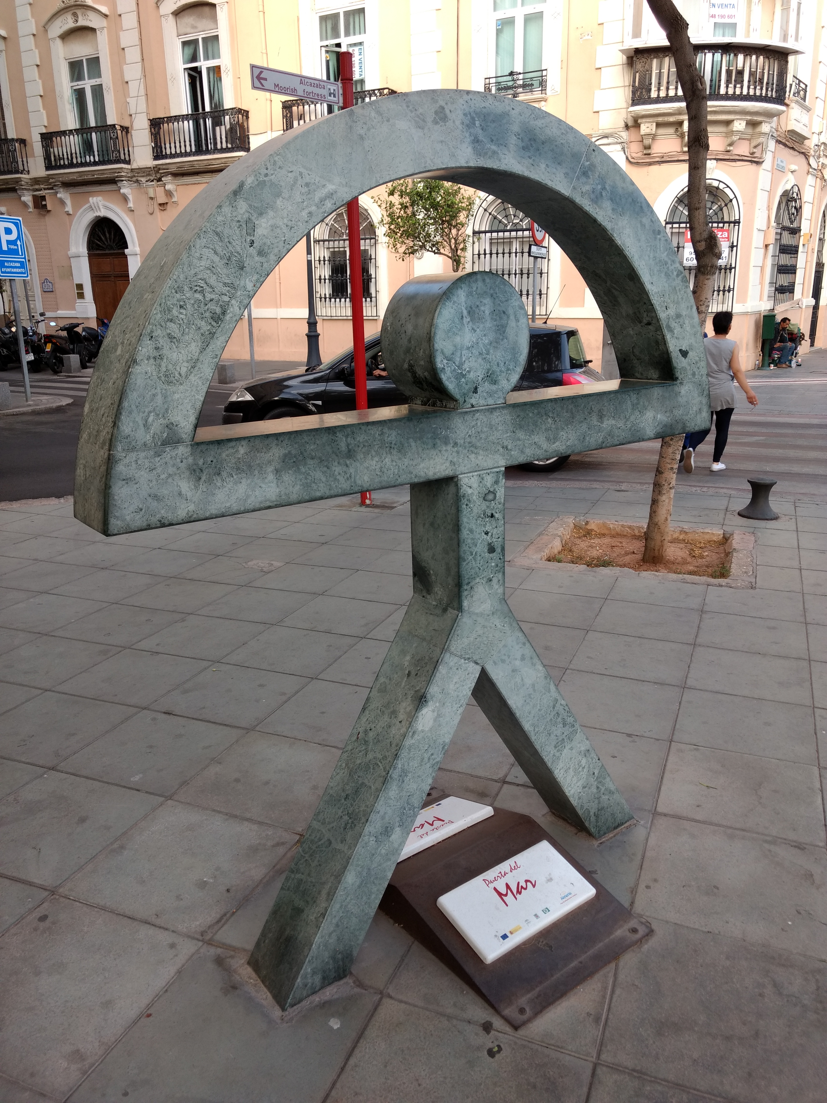 Puerta del Mar, señalando el lugar de la puerta de la antigua muralla